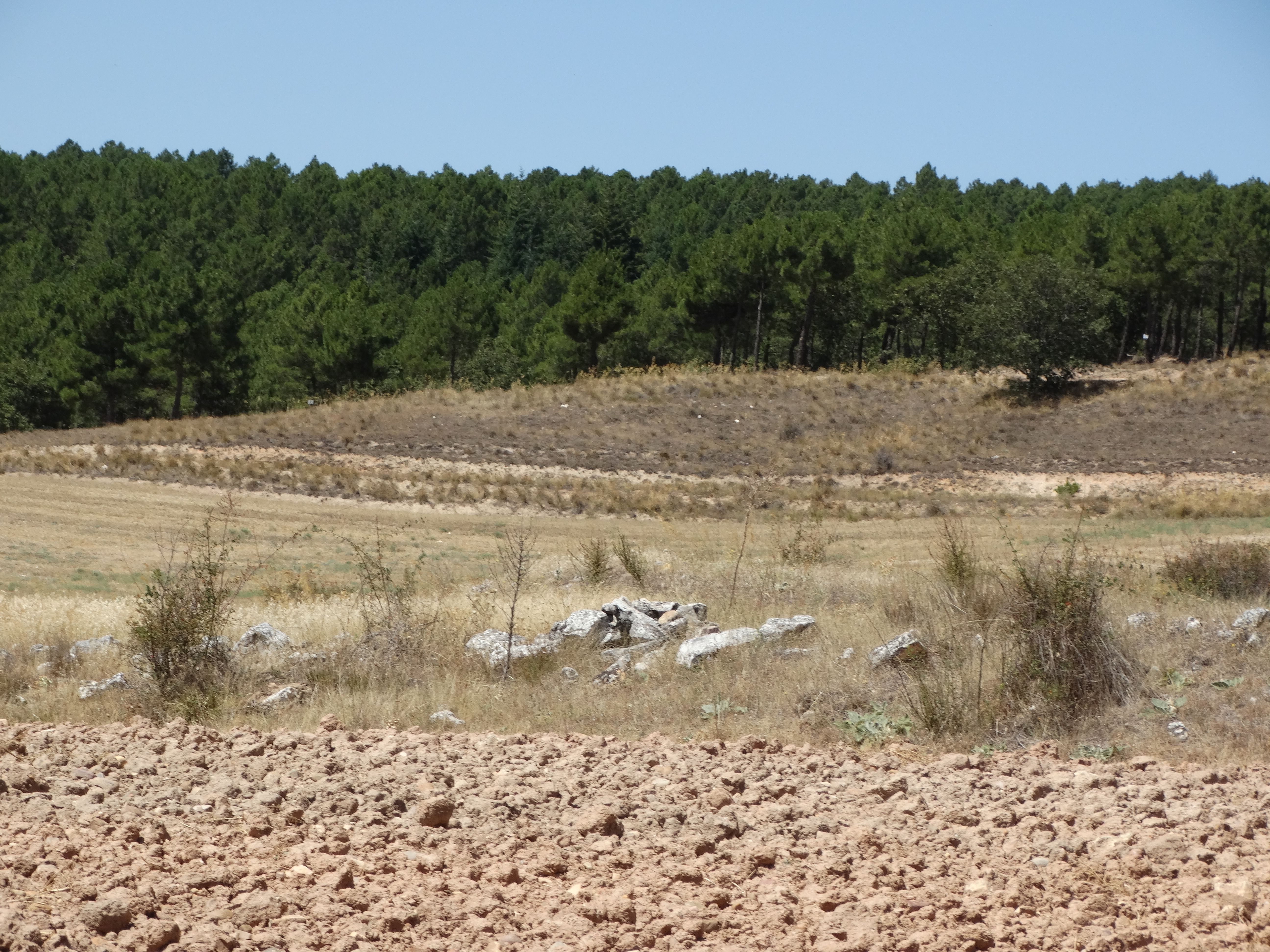 Despoblado de Hortezuela, lugar que perteneció a Navares de las Cuevas en la provincia de Segovia, España. Restos de edificaciones en el despoblado.